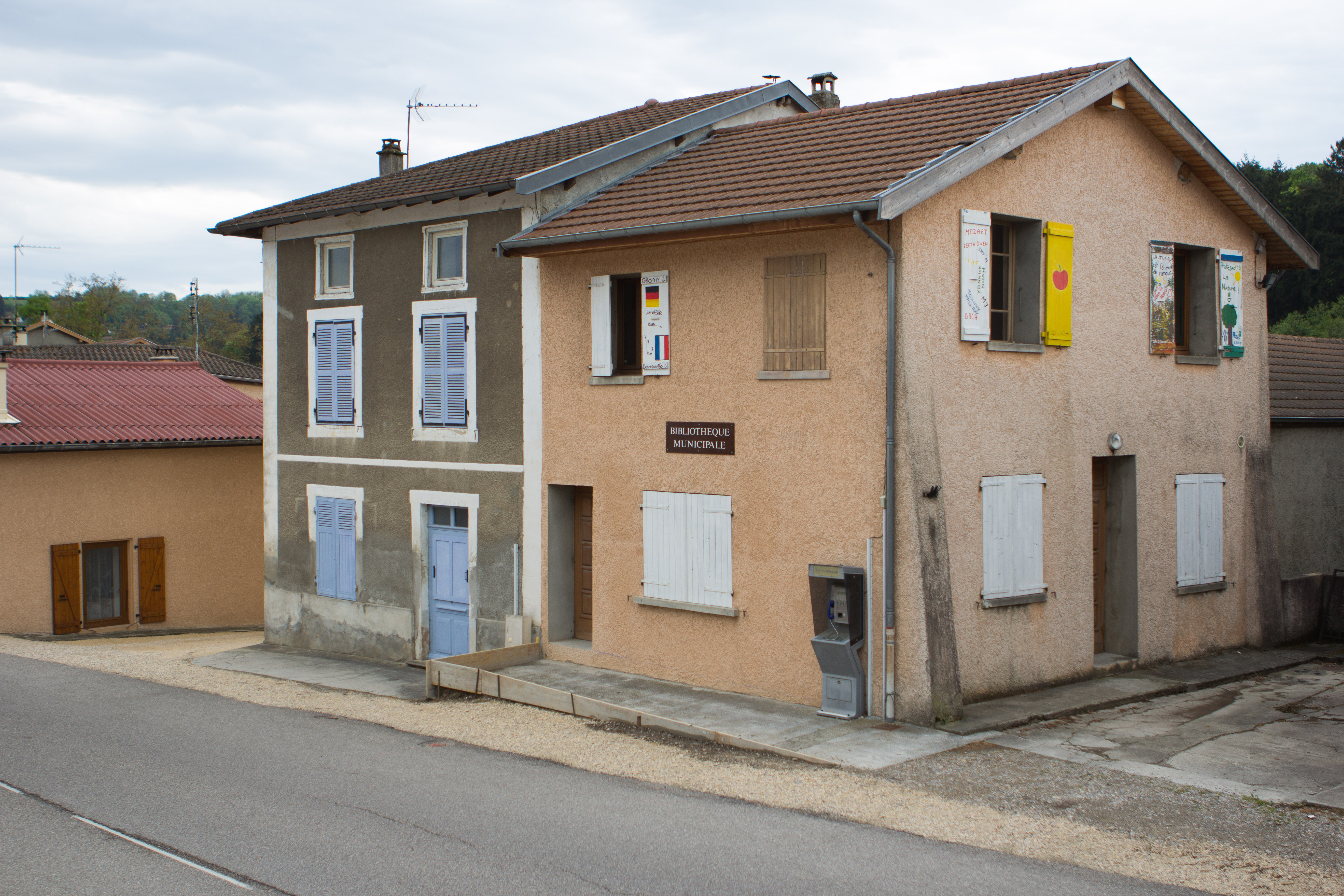 Bibliothèque de Bonnefamille (Isère, France)